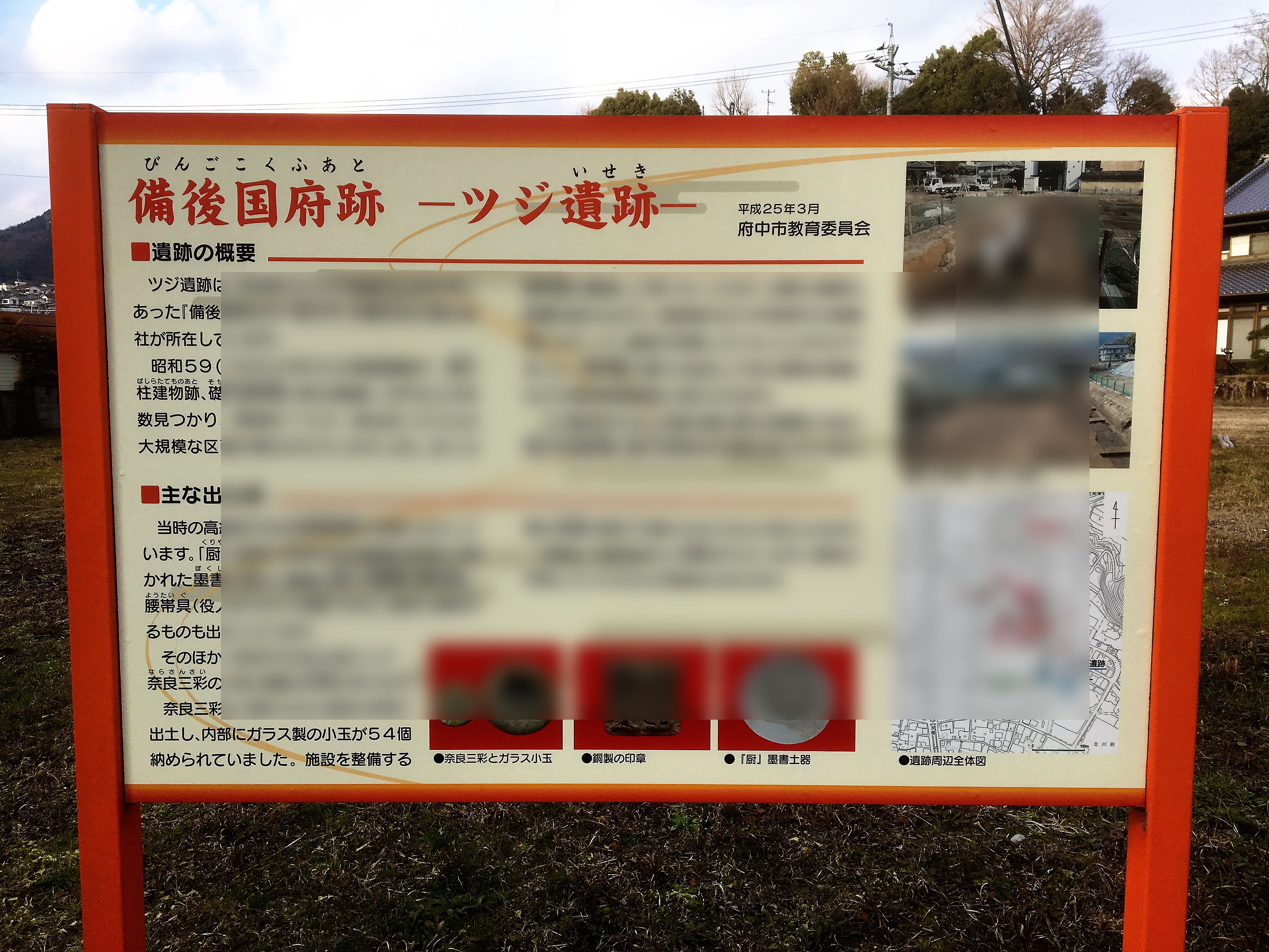 備後国府の跡地看板 ツジ遺跡。看板の後ろに広がる荒地が国府跡の遺跡発掘現場の一部（埋め戻し済み）。 著作権に配慮してボカシ処置済み